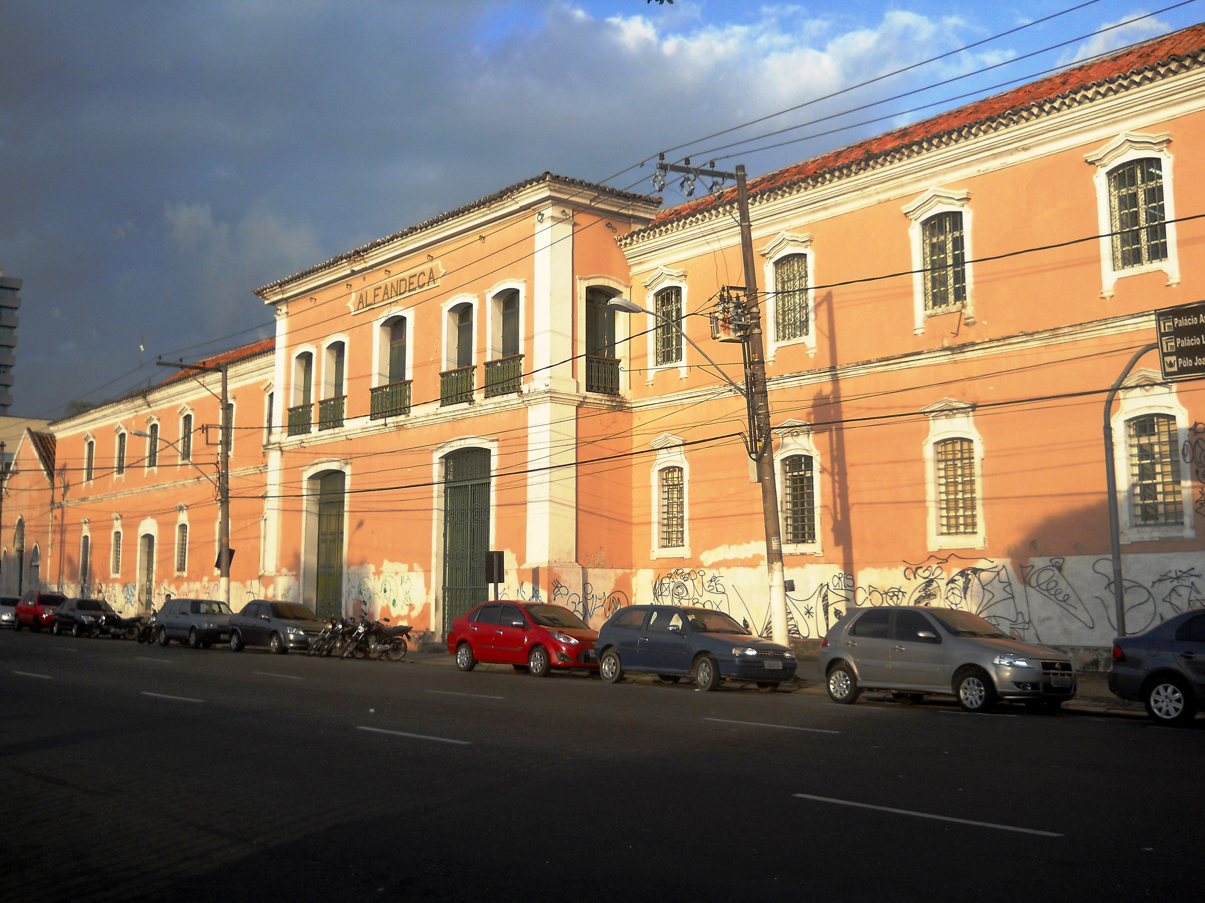 Conjunto arquitetônico e paisagístico "Ver-o-Peso" e áreas adjacentes, Praça Pedro II e Boulevard Castilhos França, inclusive o Mercado de Carne e o Mercado Bolonha de Peixe